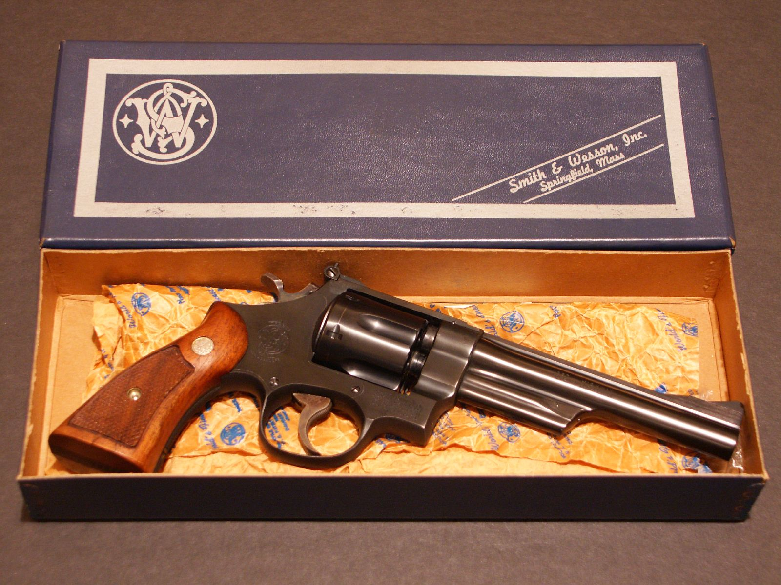 28-2 6" d